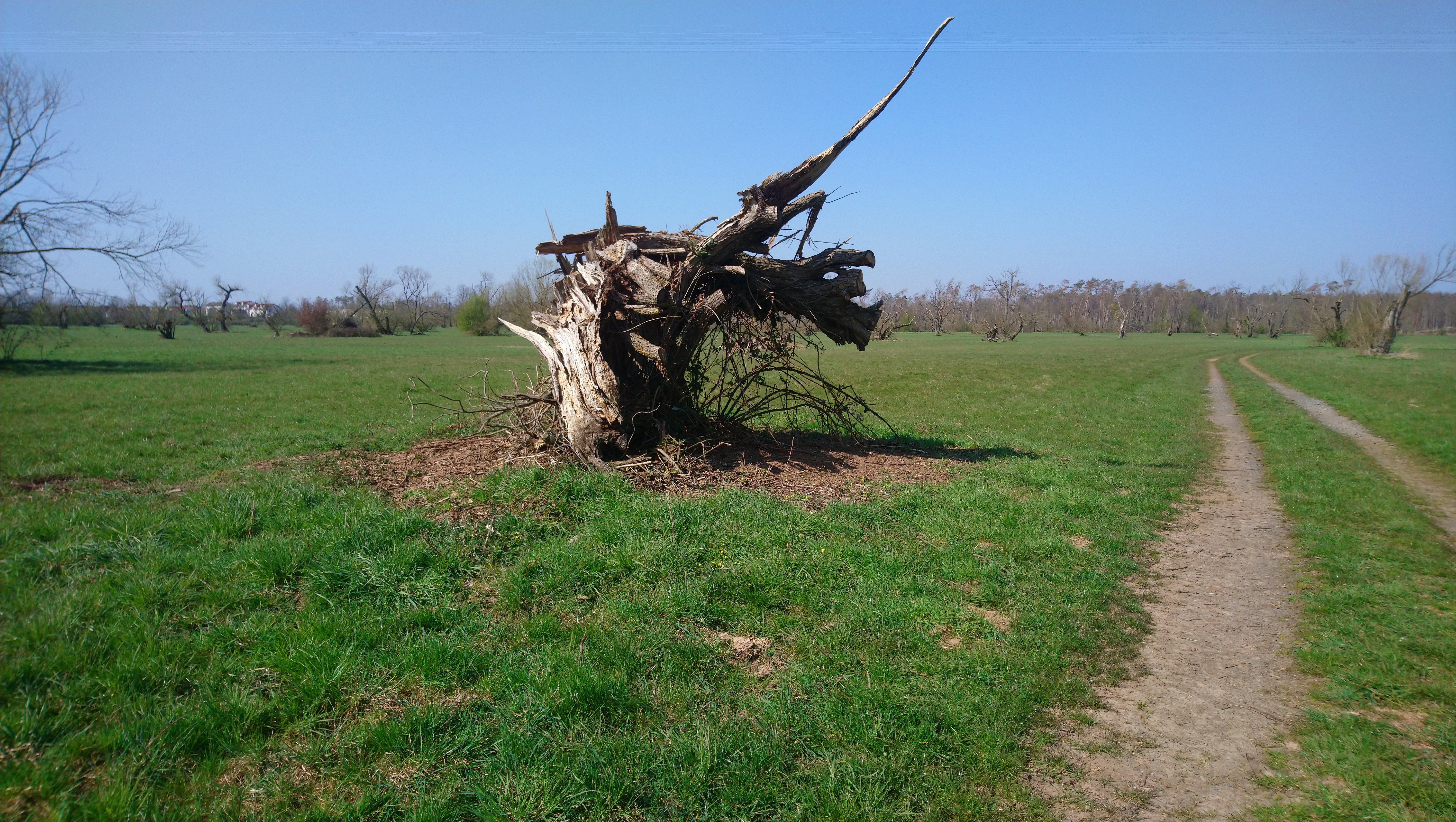 Sturmschaden vom 18. August 2019 im Prischoß